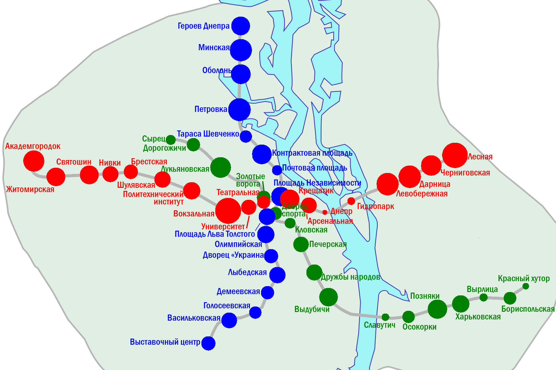 по пассажиропотоку источник - официальный сайт метрополитена